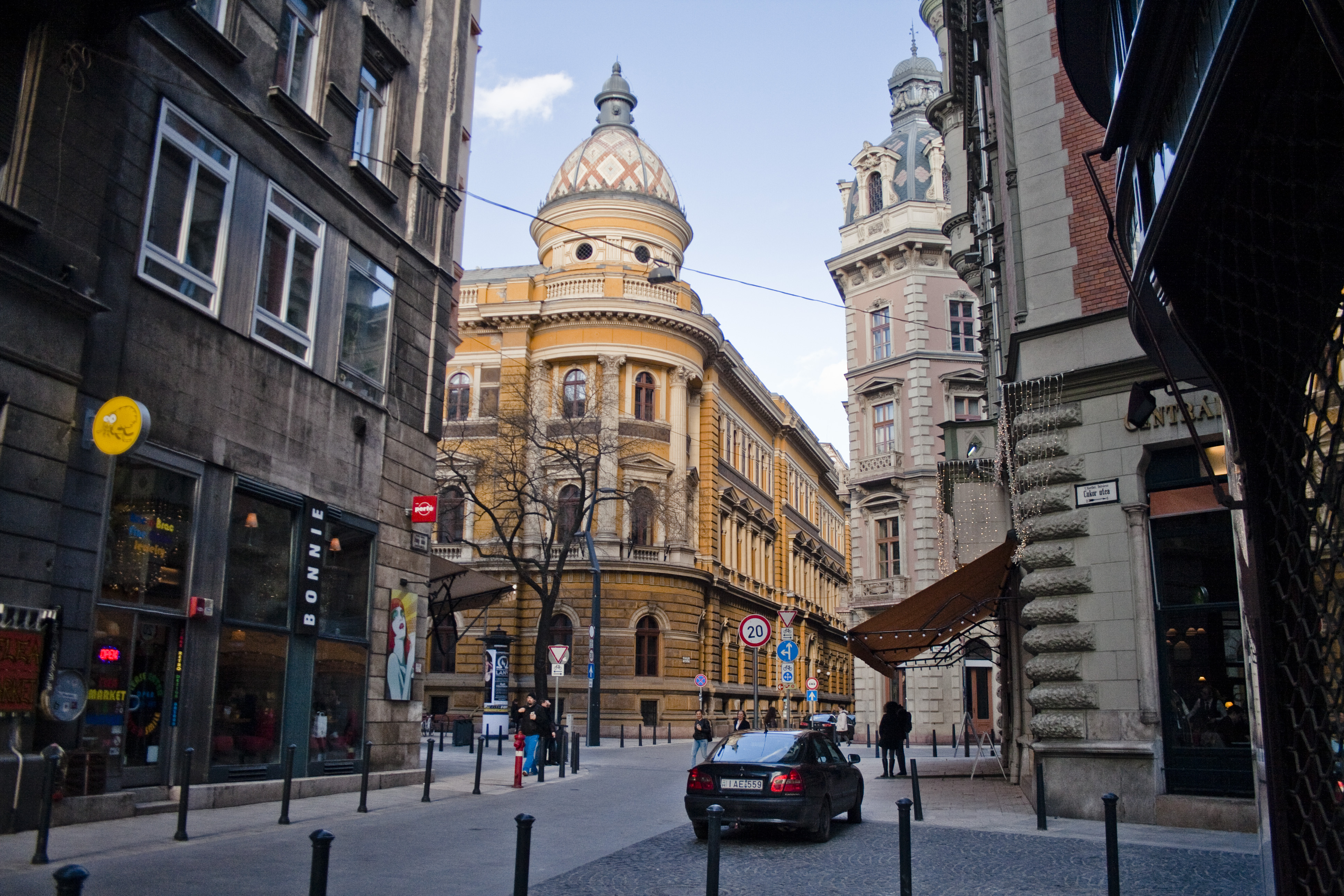 Bibliothèque universitaire de Budapest